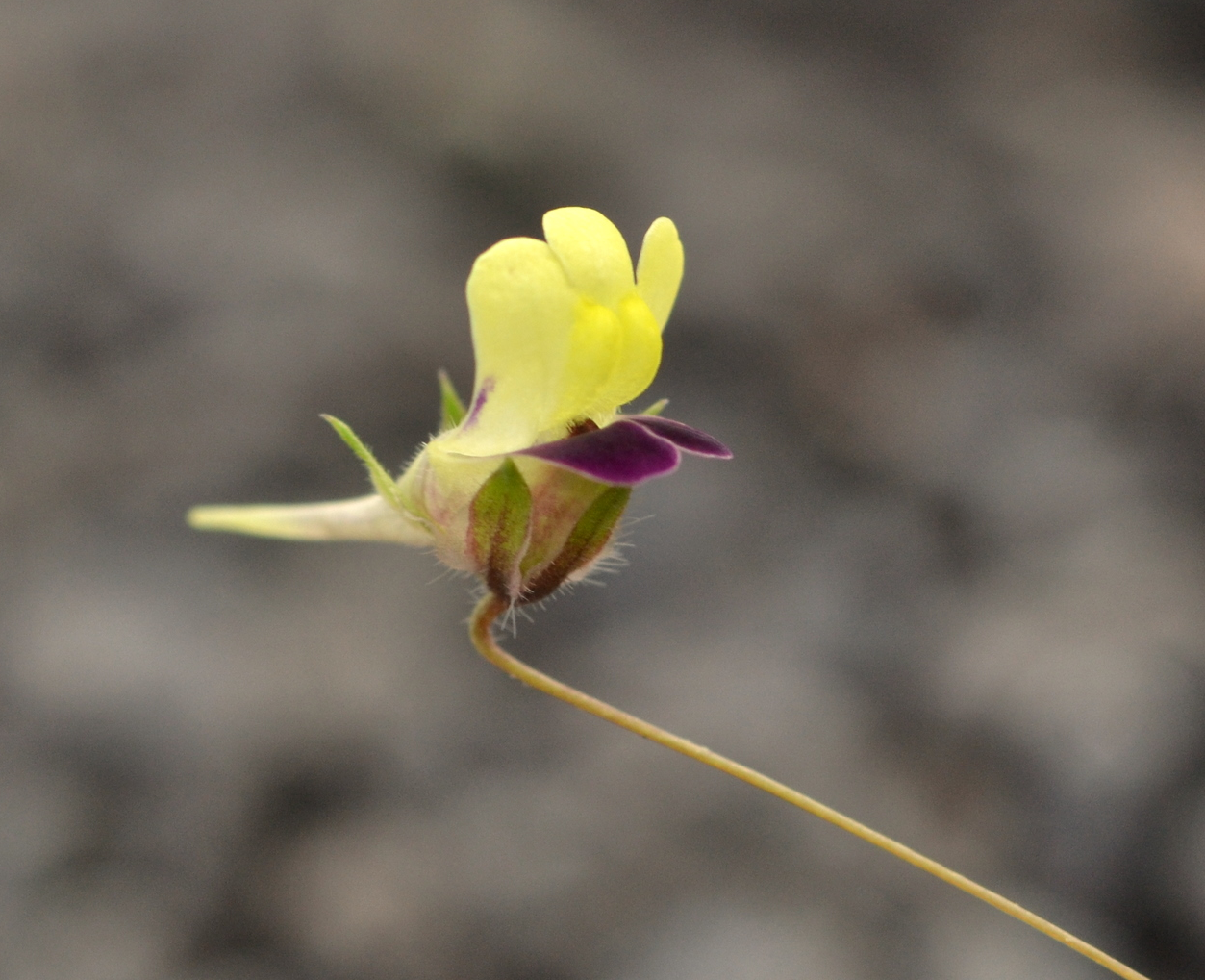 La linaire élatine est une messicole assez commune en Nord Pas de Calais. Elle apprécie les sols argileux ou marneux des cultures et des friches, mais peut également être retrouvée sur les ballast de voie ferrée. Elle se distingue de la linaire bâtarde(kickxia spuria) par son éperon droit.